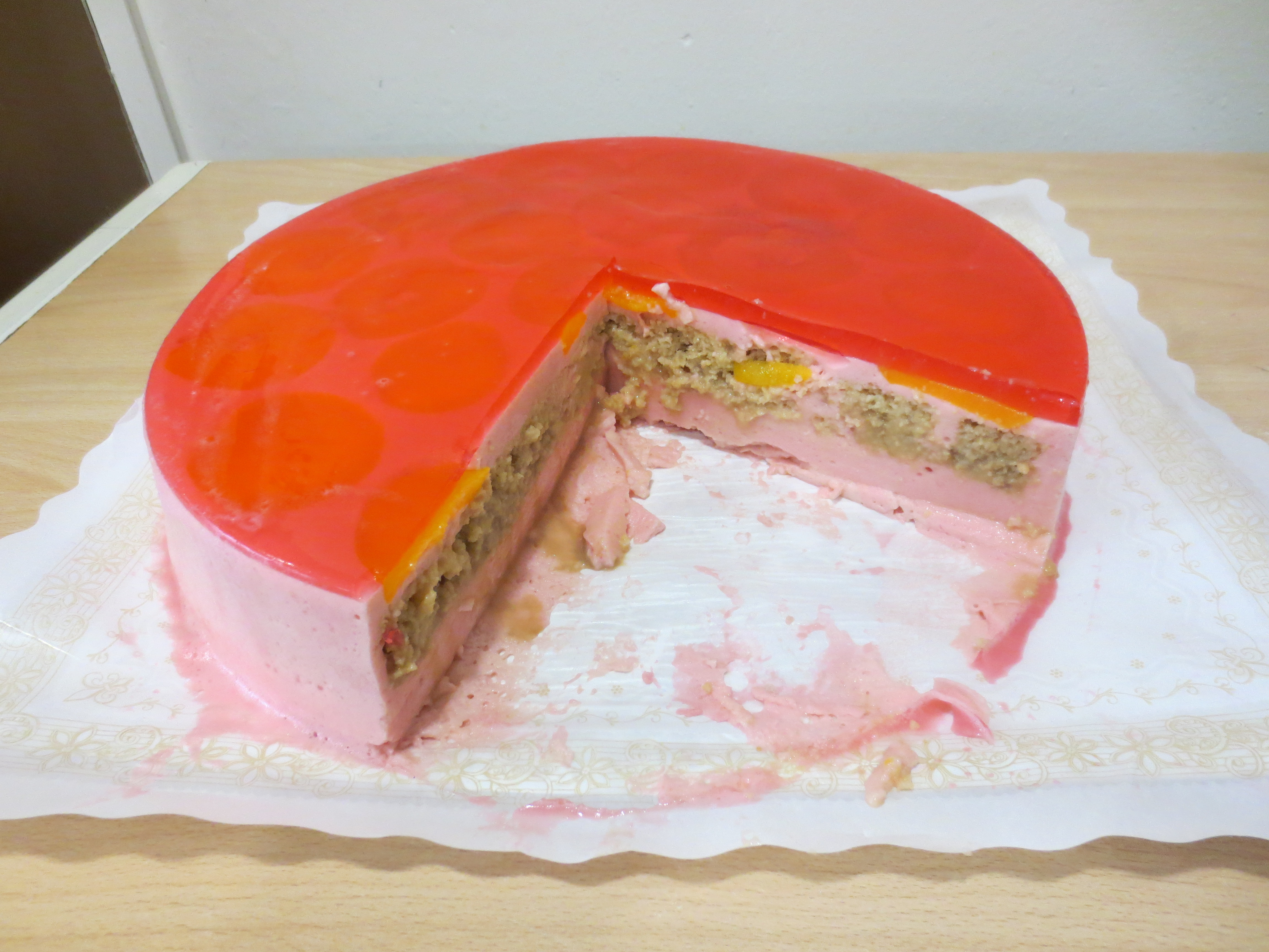 Torta helada peruana preparada en España